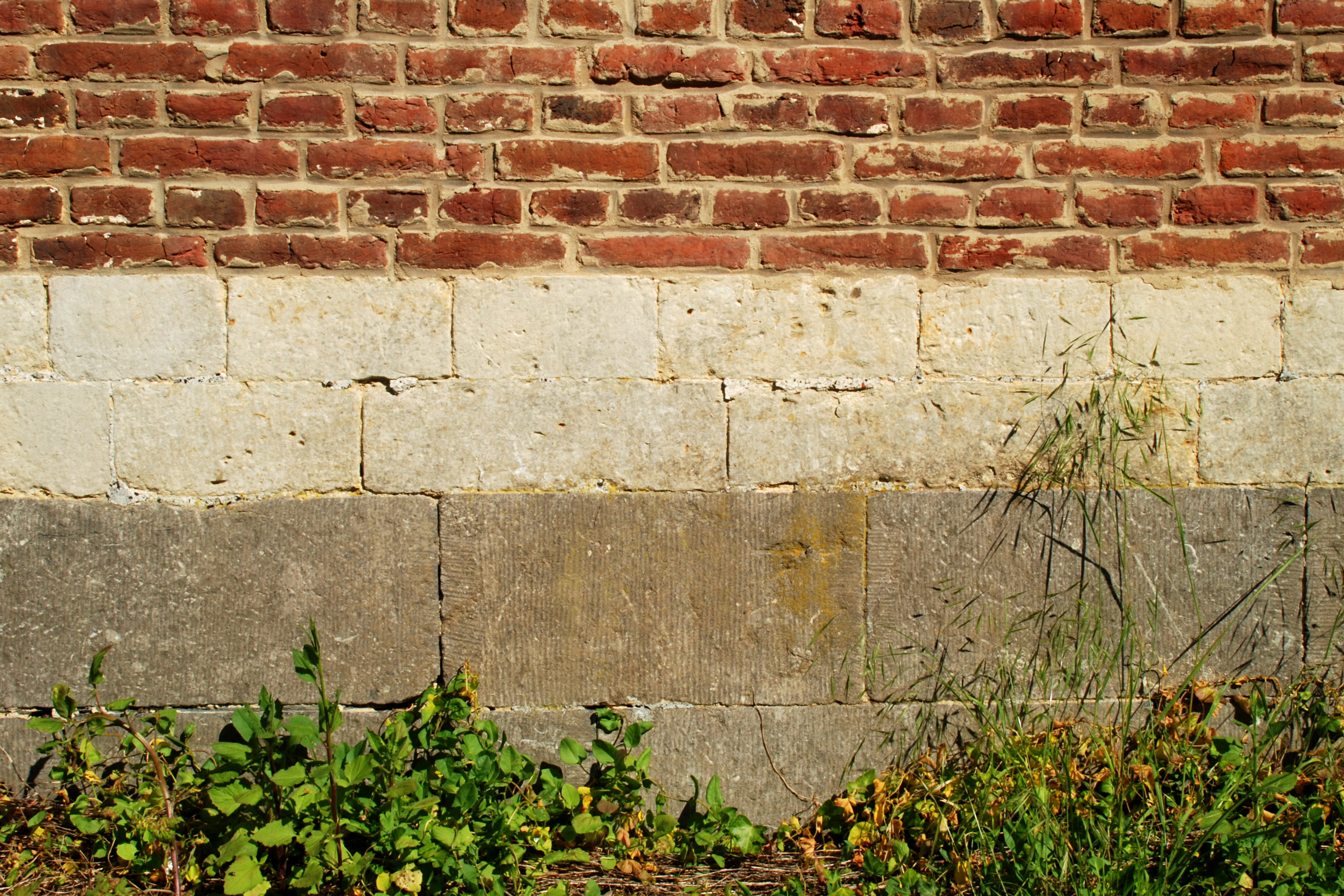 Belgique - Brabant wallon - Église de Court-Saint-Étienne